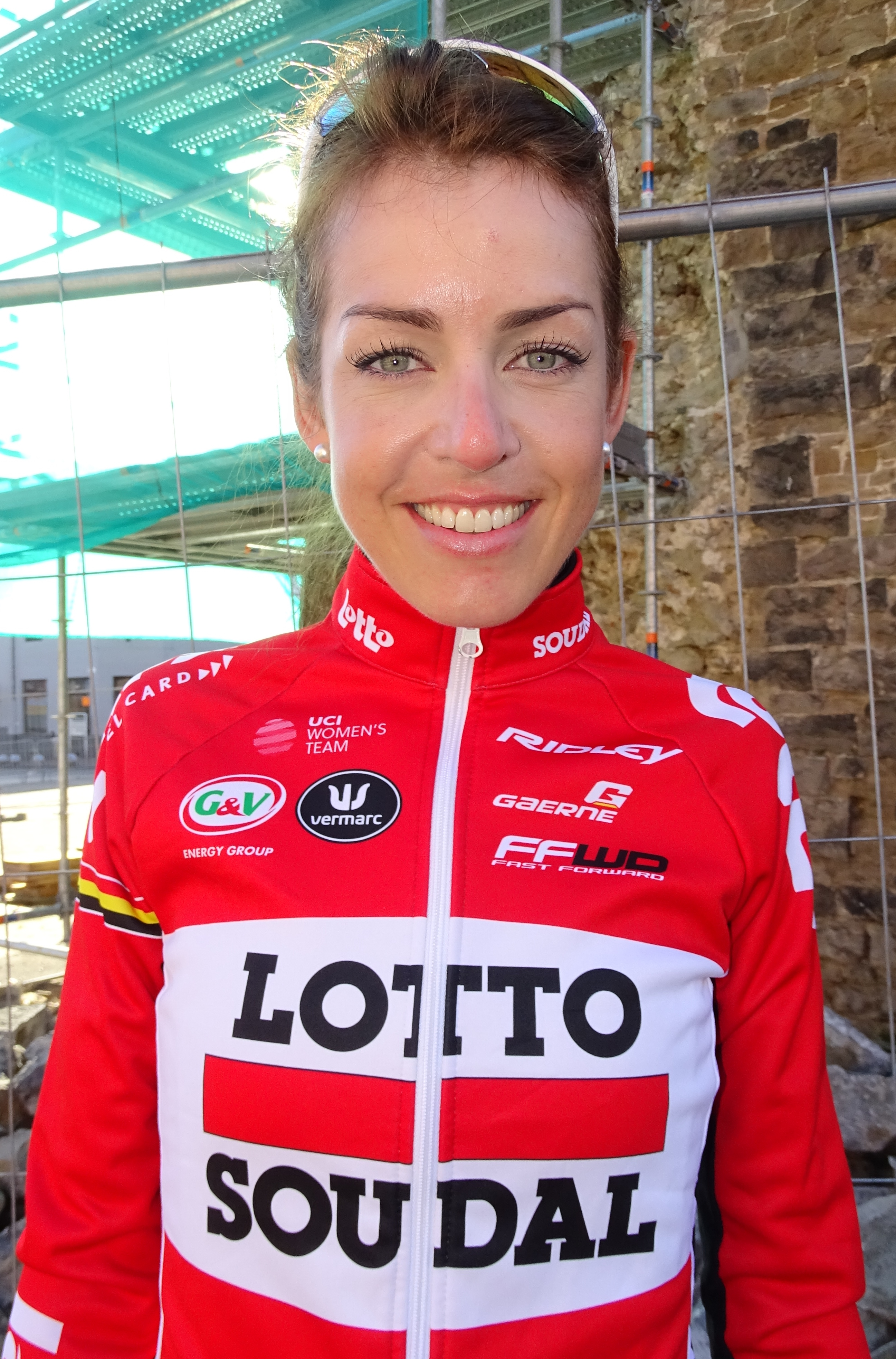 Reportage réalisé le mercredi 2 mars à l'occasion du départ du Samyn des Dames 2016 et du Samyn 2016 à Quaregnon, Belgique.